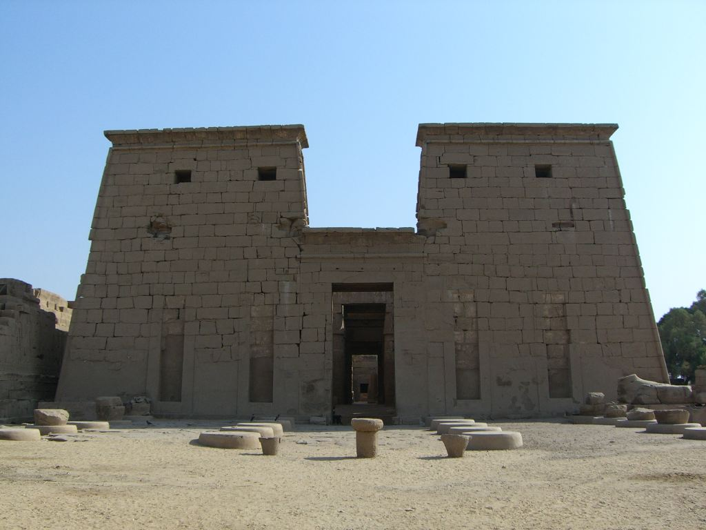 Vue du parvis et du pylône du temple de Khonsou de Karnak - XXe dynastie égyptienne